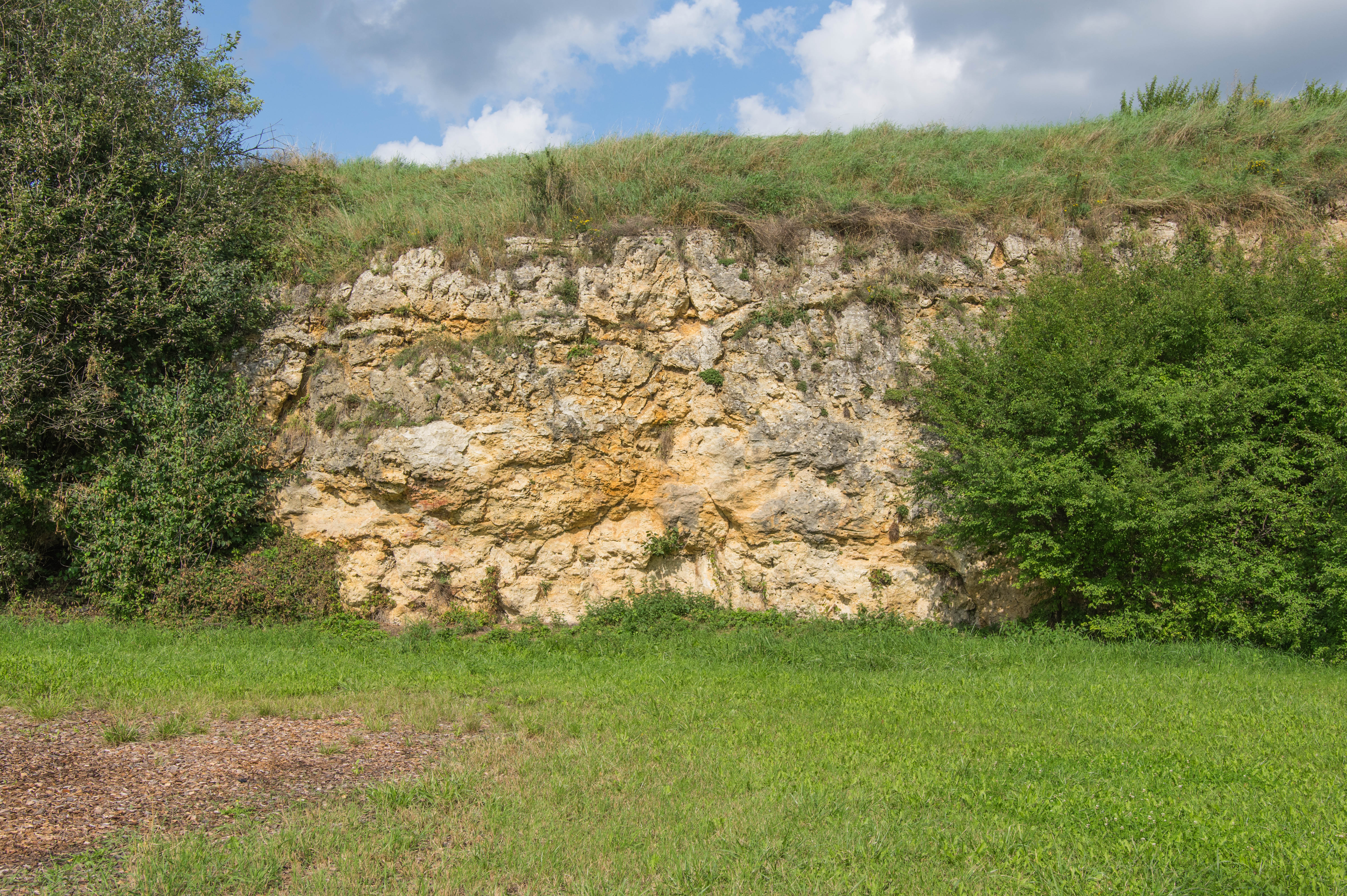 Text folgt nach upload; das Geotop wurde zu den 100 schönsten Geotopen Bayerns benannt. Geotop 779A015